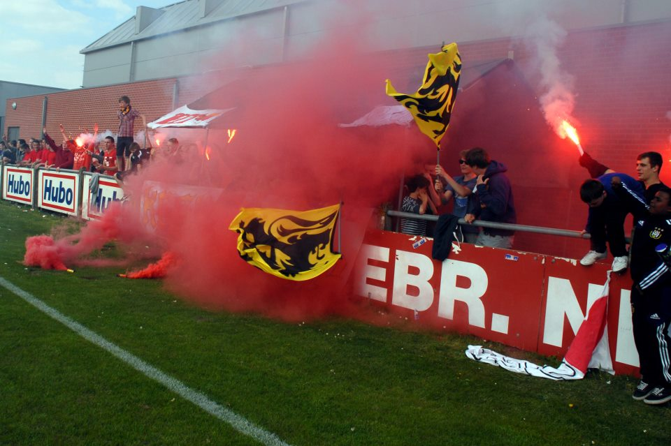 sfeerbeeld wedstrijd Reet SK